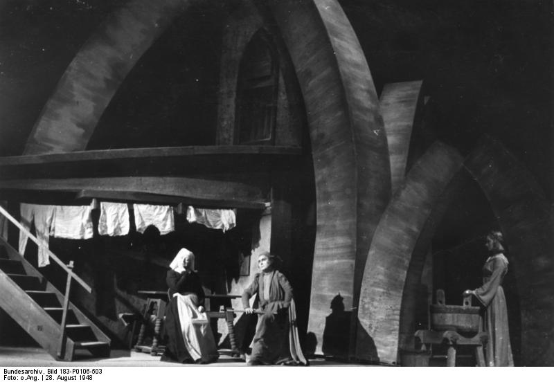 Weimar, Nationaltheater, Theaterspiel "Faust" ADN-ZB Sowjetische Besatzungszone Deutschlands: Wiedereröffnung des Deutschen Nationaltheaters in Weimar anläßlich des 199. Geburtstages von Johann Wolfgang von Goethe am 28. August 1948 U.B.z.: Eine Szene aus Goethes "Faust" Thüringer Bilderdienst Weimar 2041-48